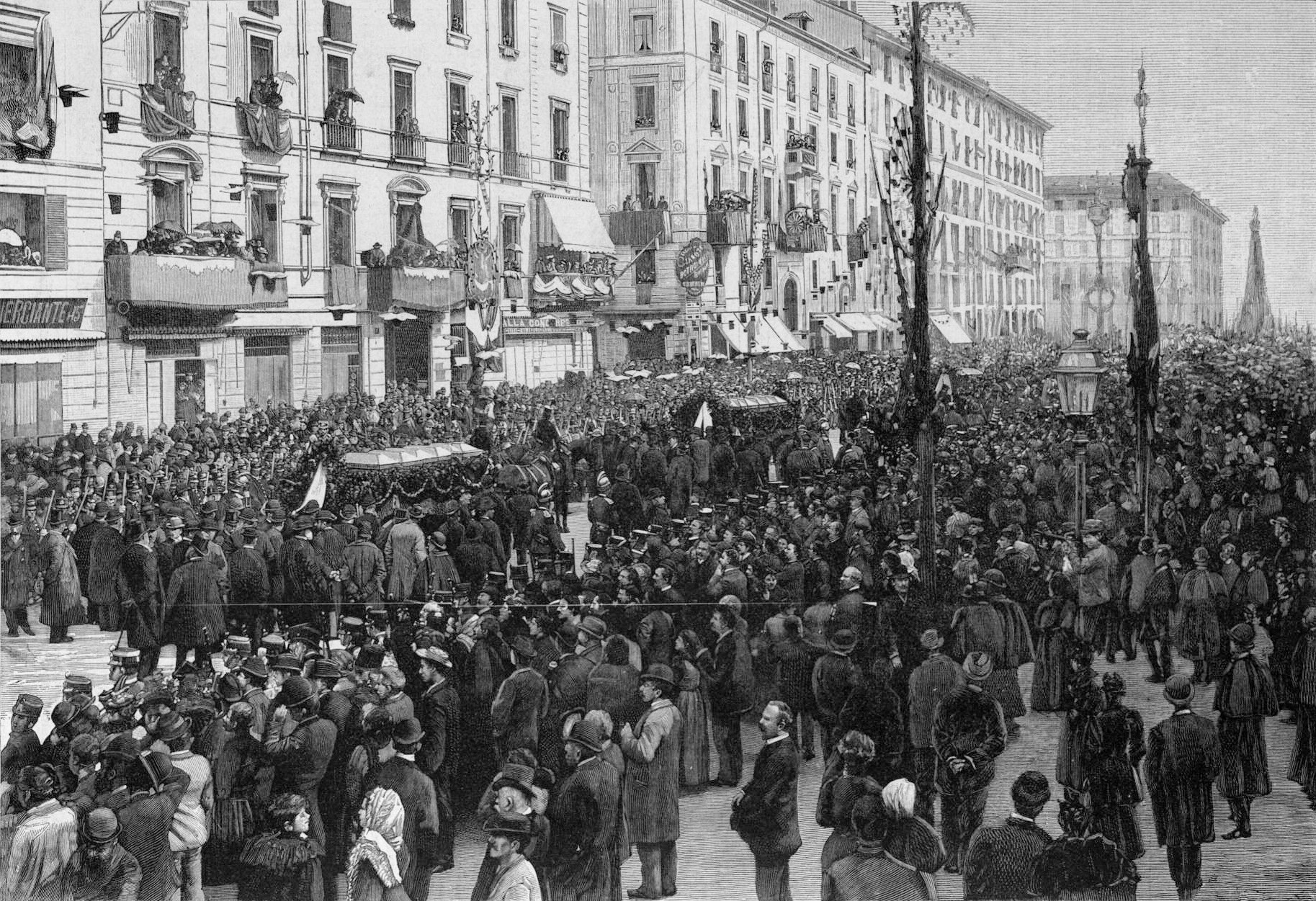 Monumento alle Cinque Giornate - Trasporto ossa dei caduti